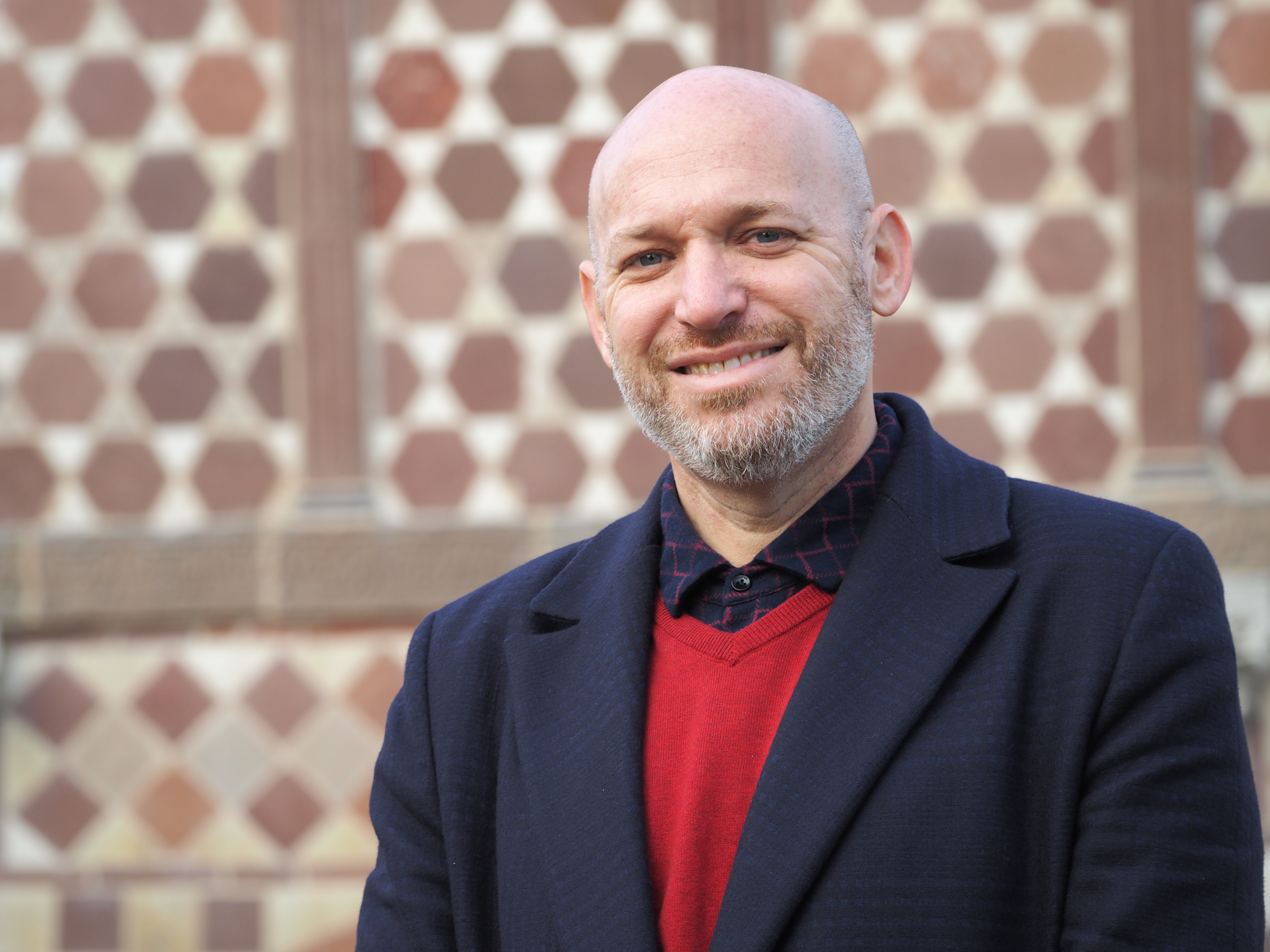 פרופסור אסף פינקוס